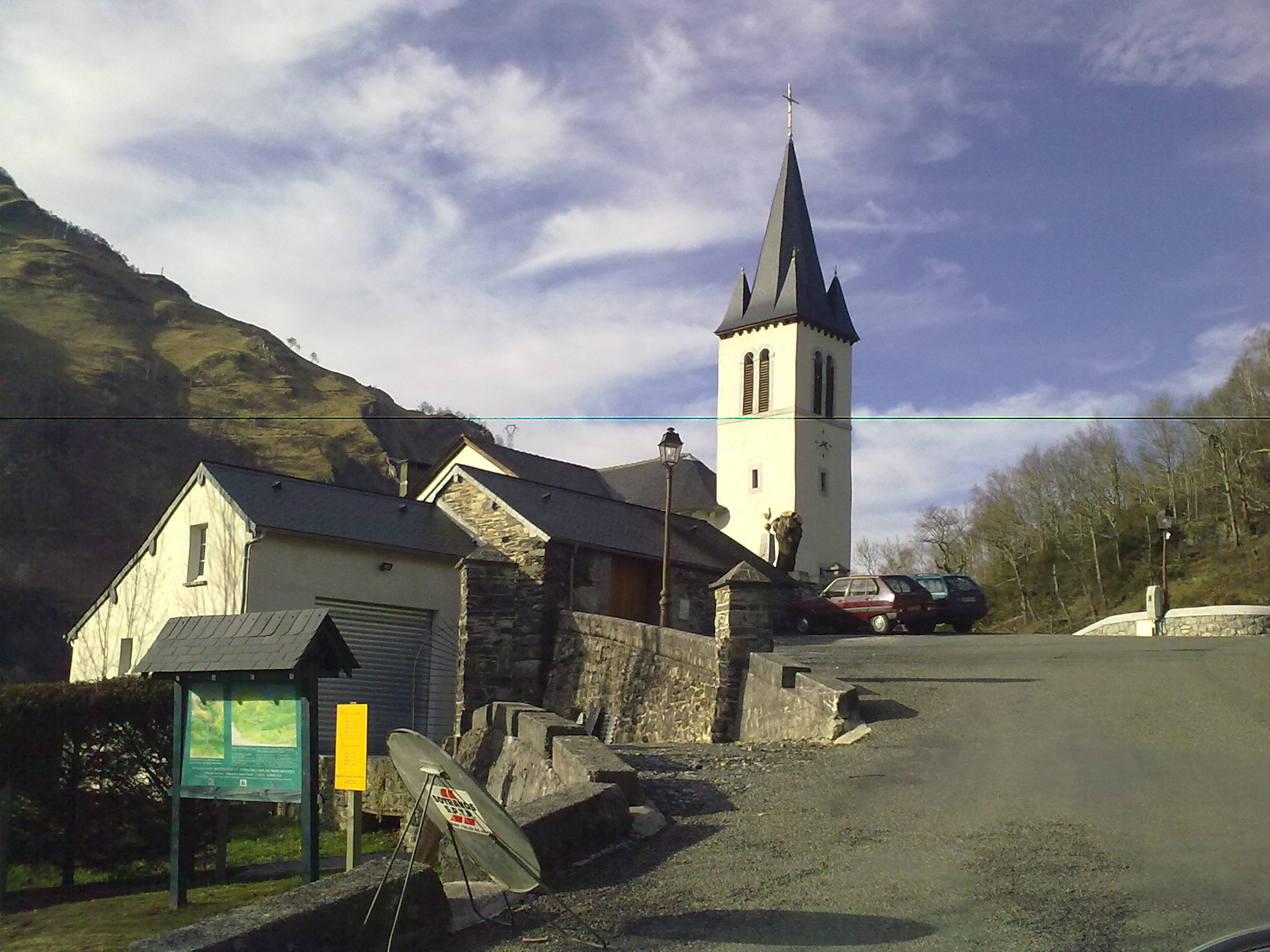 Eglise de Louvie-Soubiron